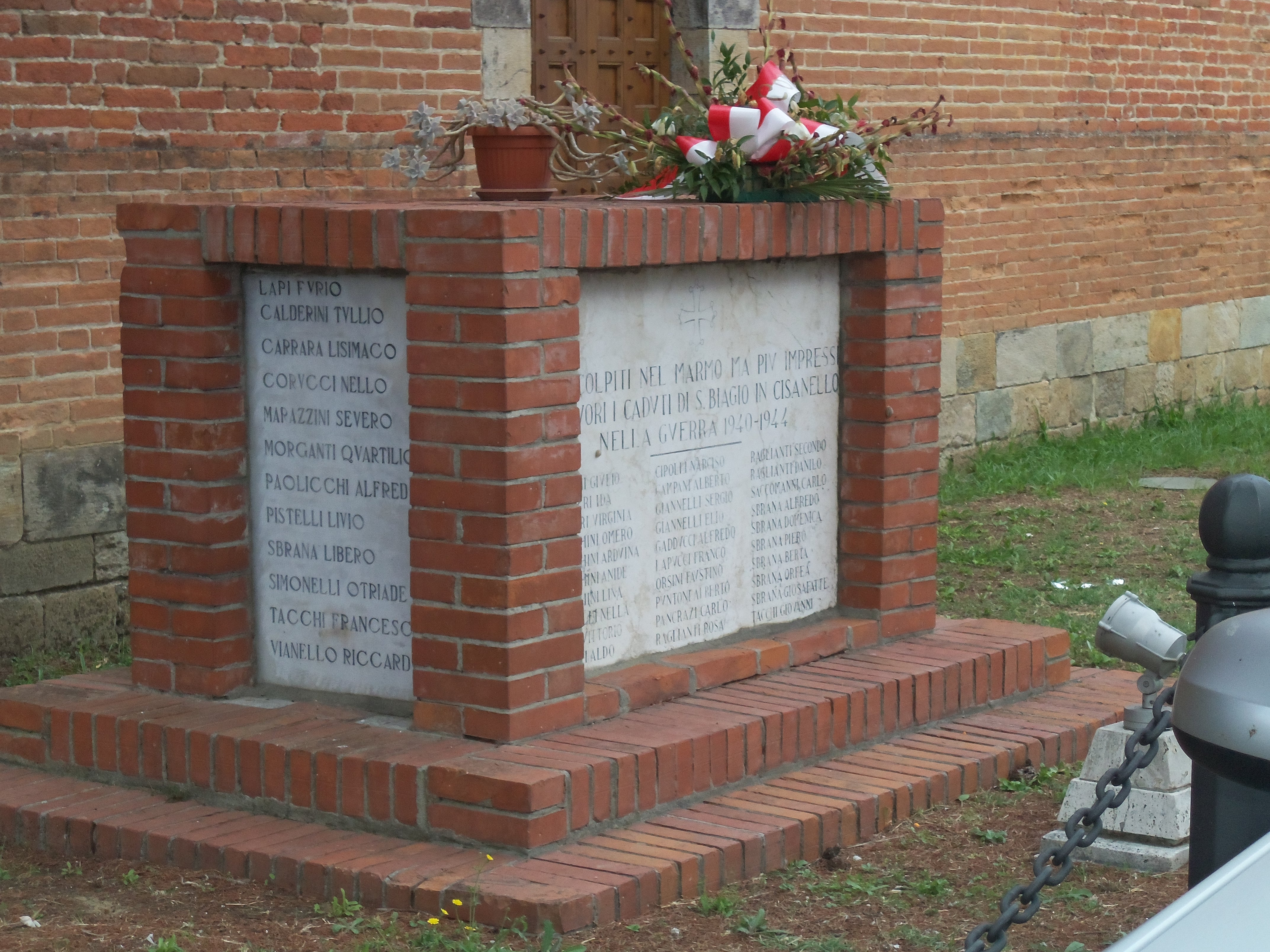 altare, ricordo eccidio